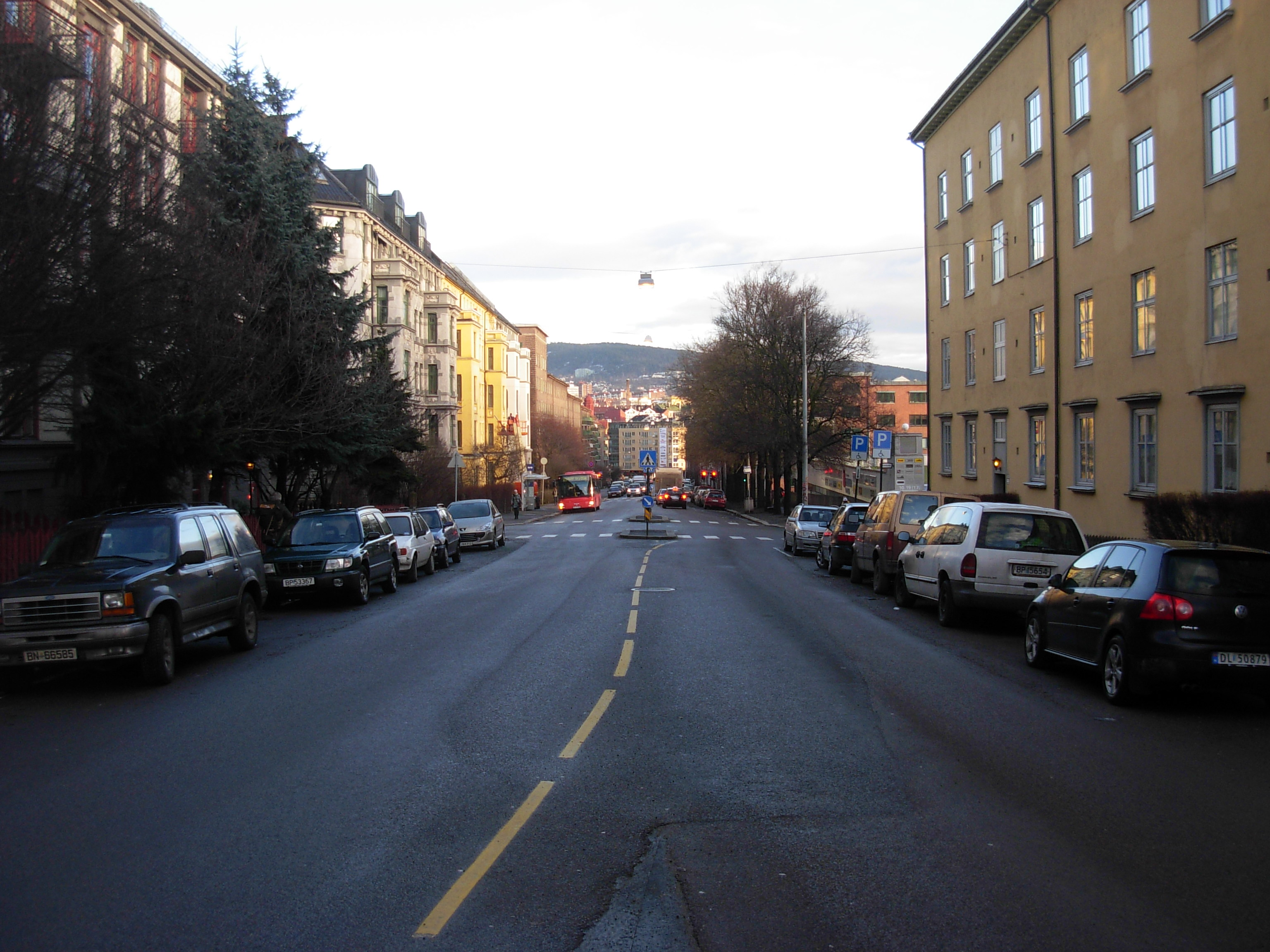 Waldemar Thranes gate, Oslo, seen eastward fra Bergstien